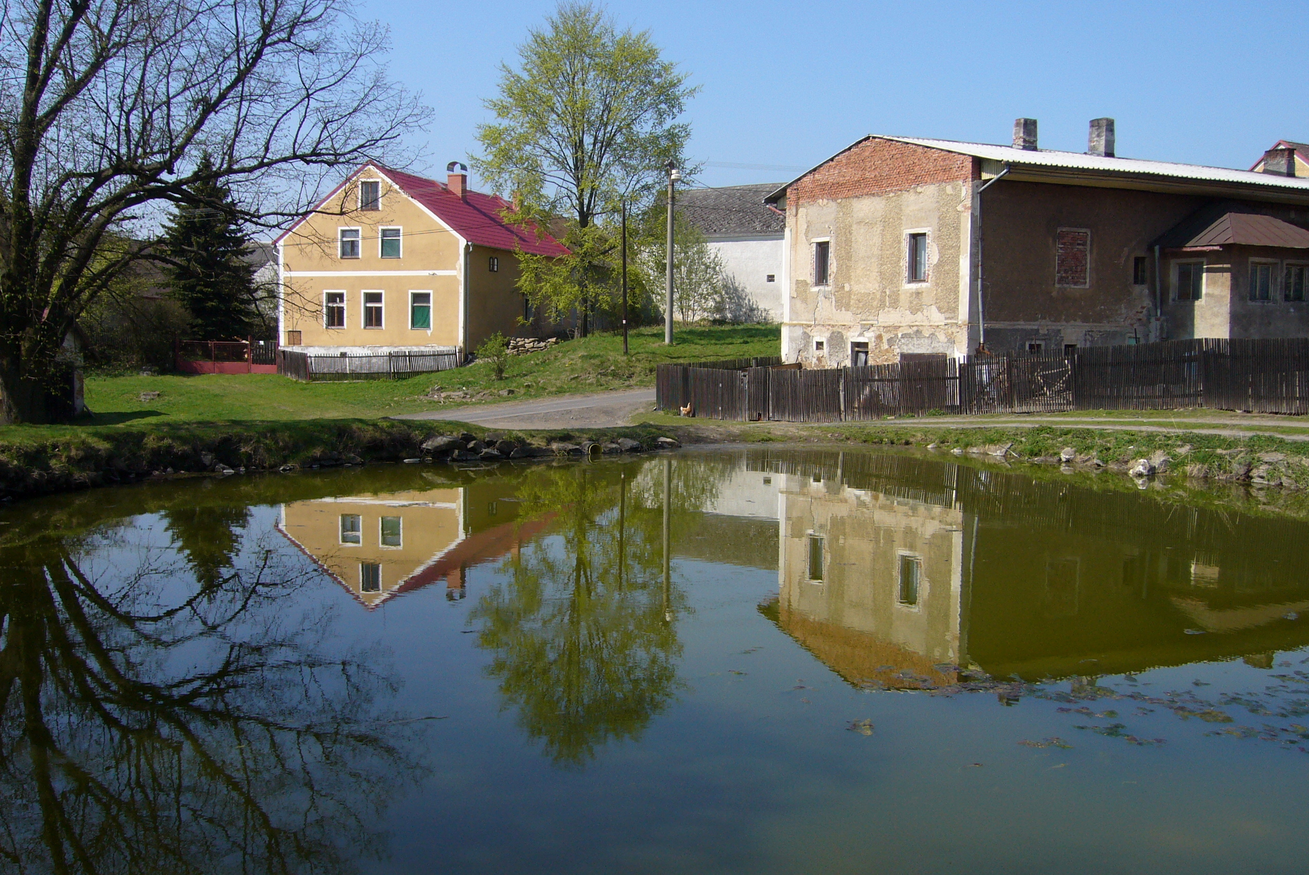 Ratiboř - náves s rybníkem